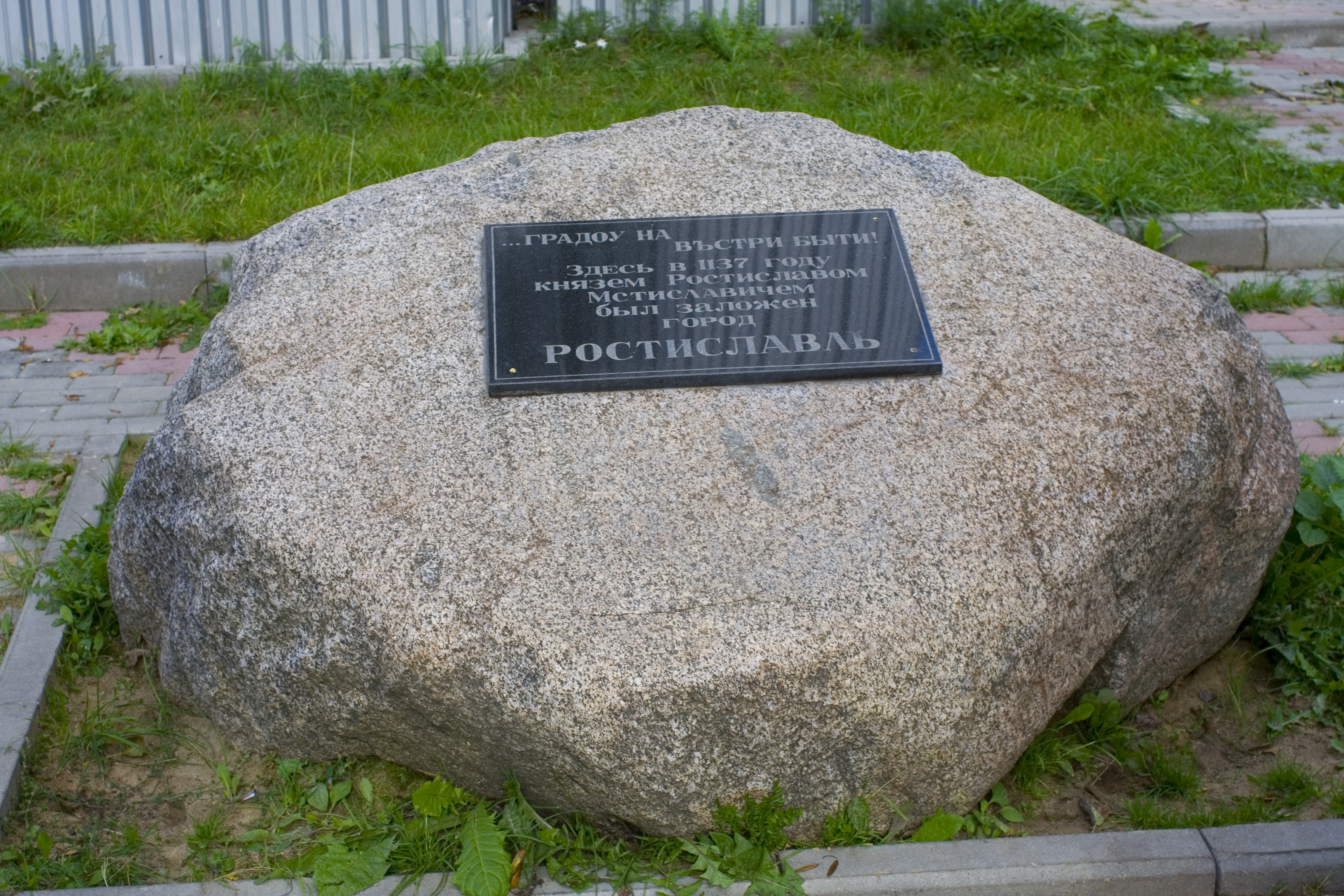 Памятный камень в центре Рославля, повестующий об основании города